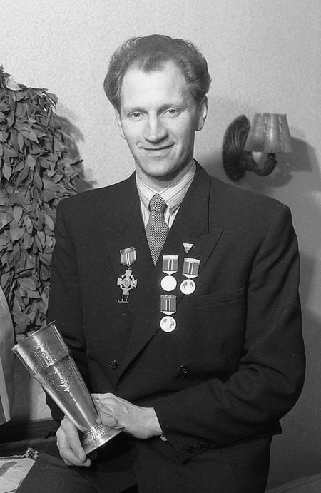 Skøyteløperen Henry Wahl